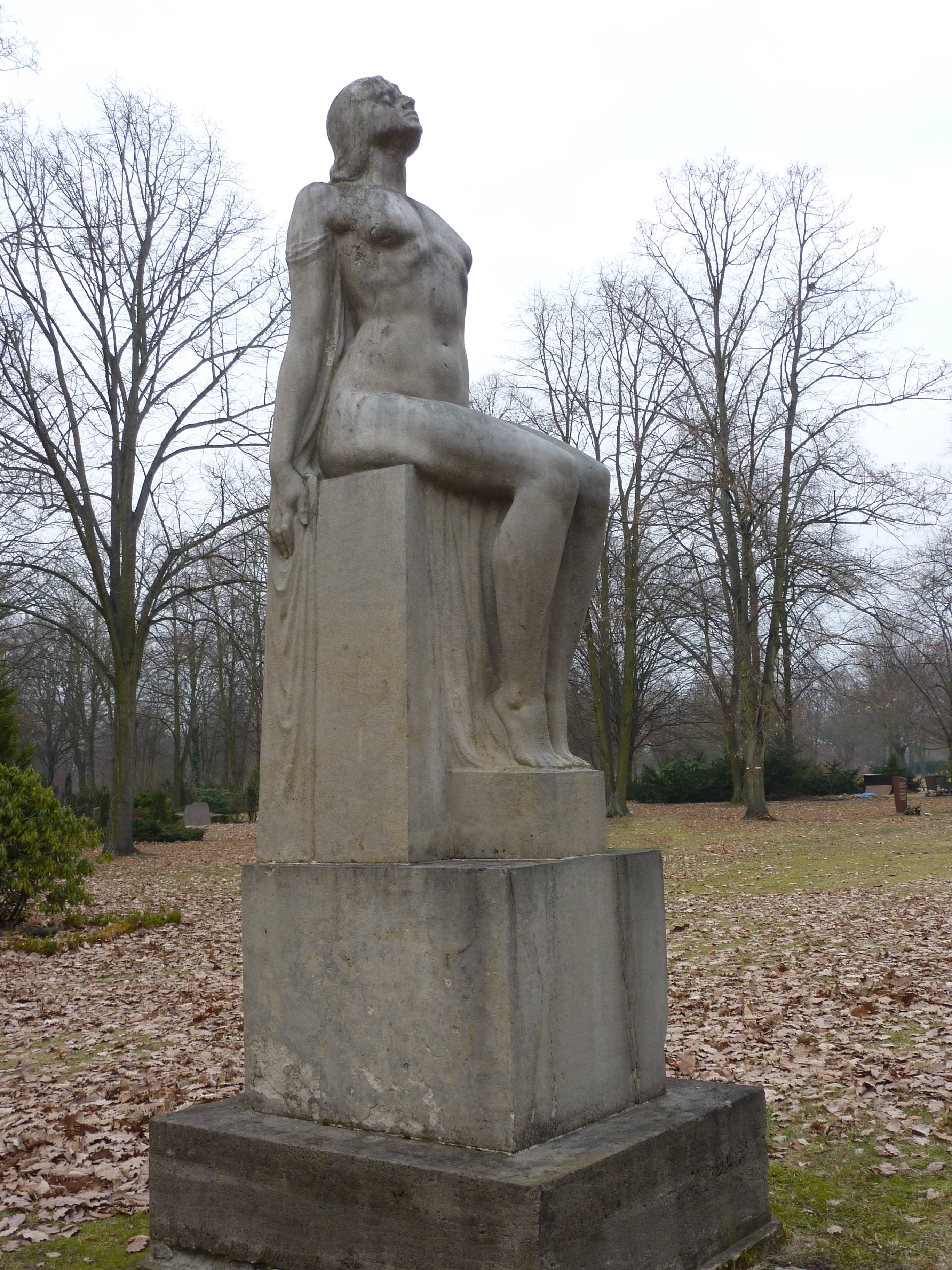 Persefone, griechische Todesgöttin, auf dem Parkfriedhof Berlin-Neukölln, Max Kruse 1915~